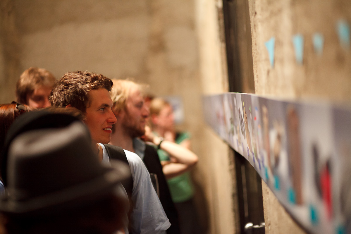 Výstava soutěže Mladý obal, Brno, 2011